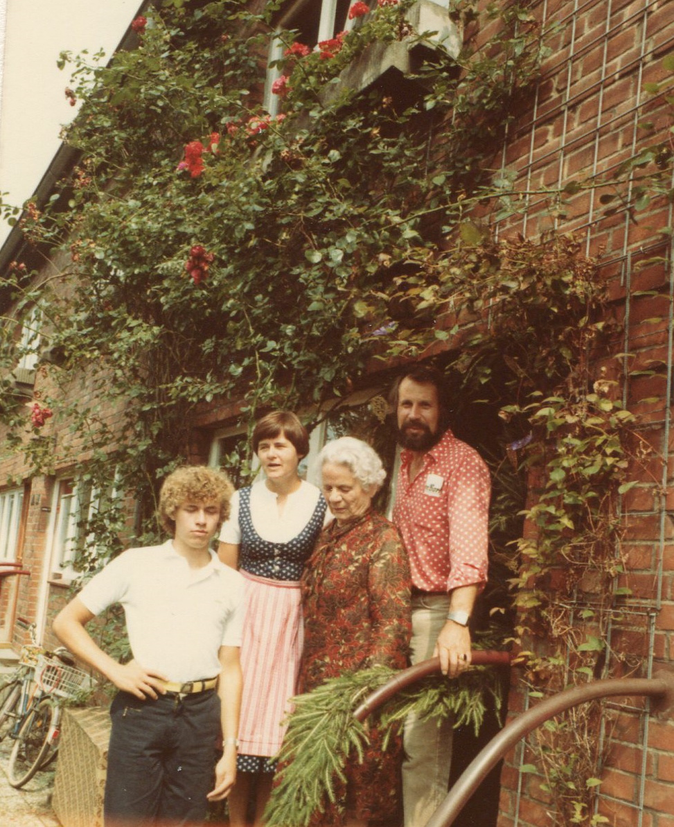 Familie Lühr Hamburg Kleinborstel